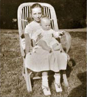 Елена Михайловна и Мария Михайловна Морозовы (Леля и Маруся)